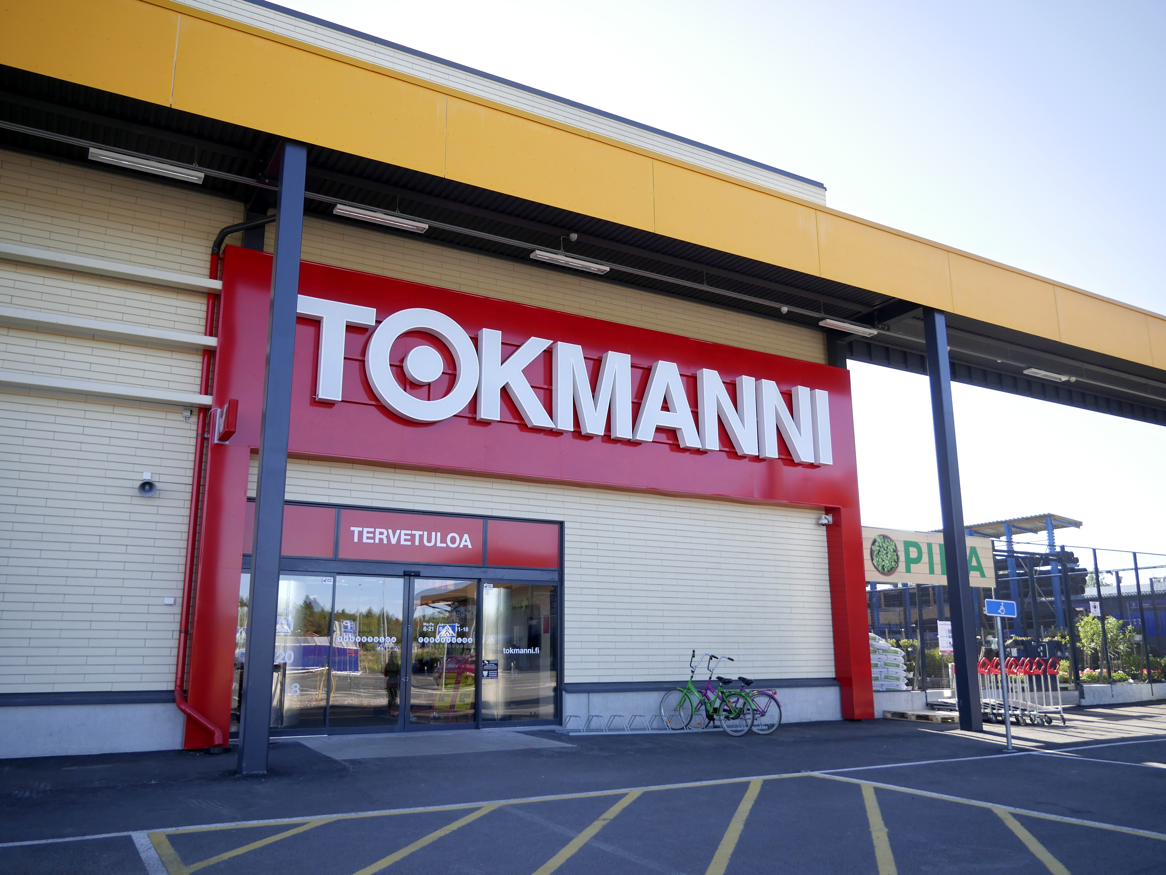 Lapuan Tokmanni.